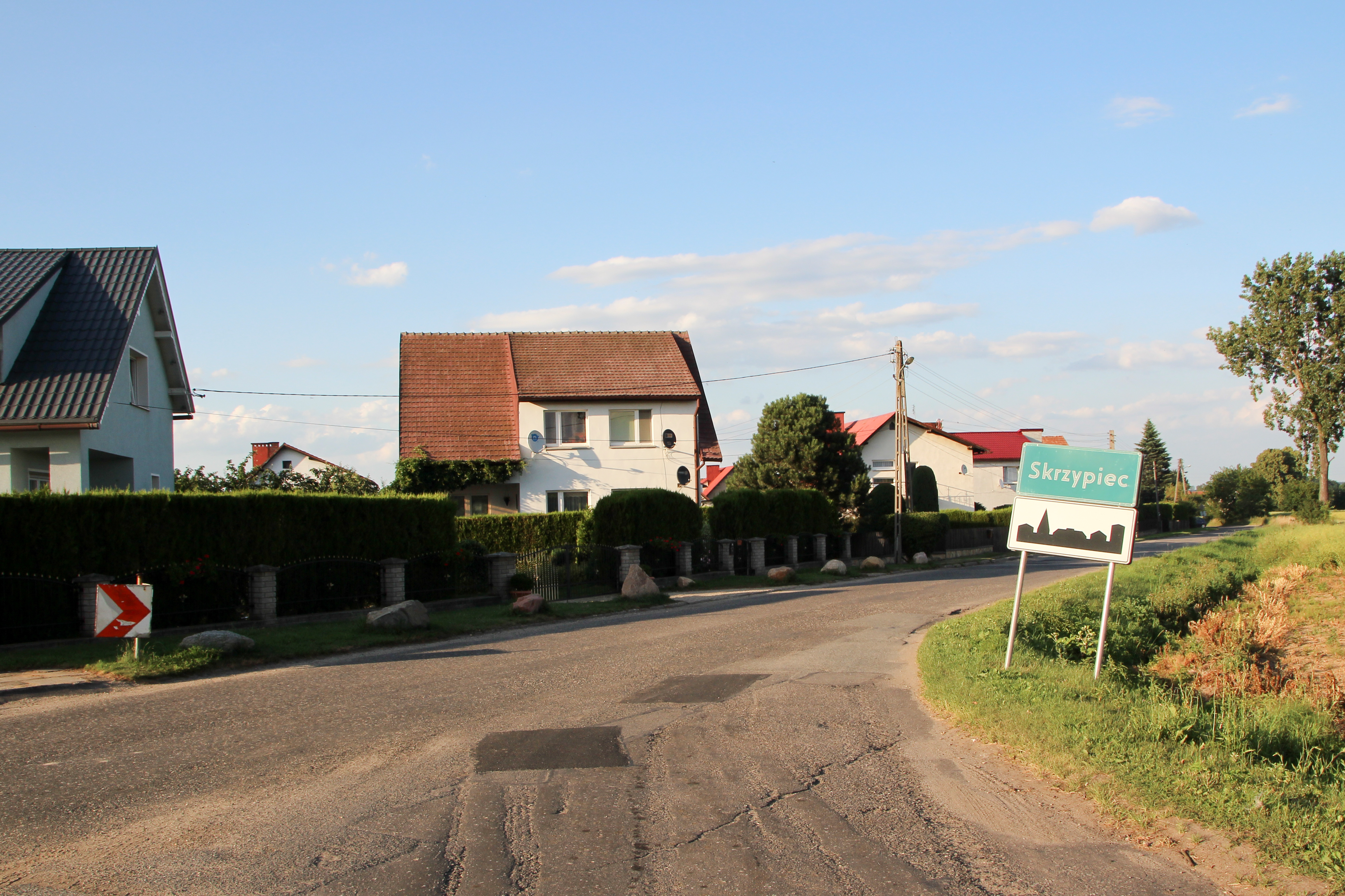 Skrzypiec -wieś w Polsce w województwie opolskim, w powiecie prudnickim w gminie Lubrza.